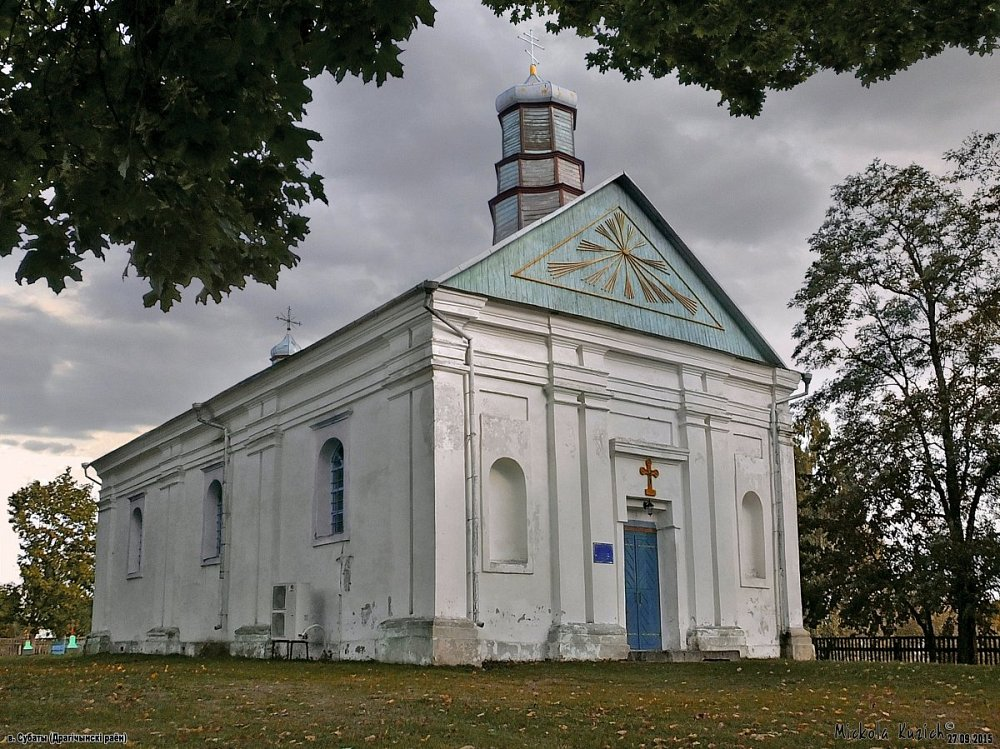 Субаты. Свята-Раства-Багародзіцкая царква